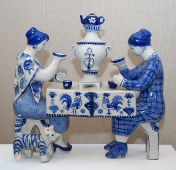 Скульптура "Чаепитие"Фарфор.Гжель.1966 г.